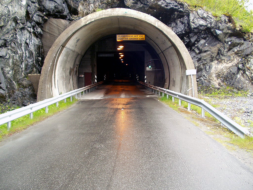 Øksfjordtunnelen